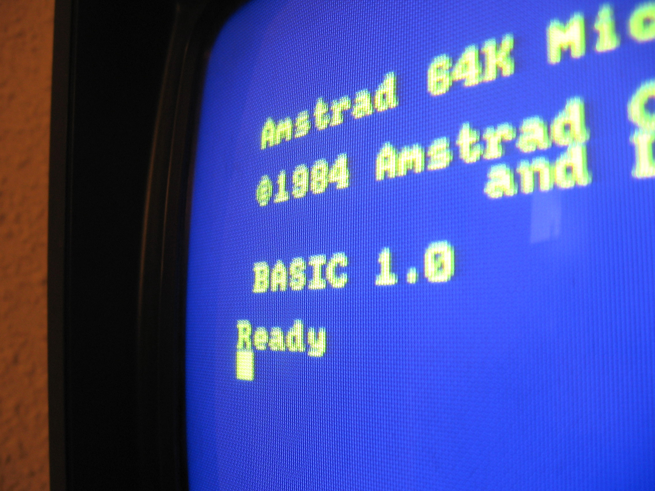 Amstrad CPC 464におけるLocomotive BASIC.